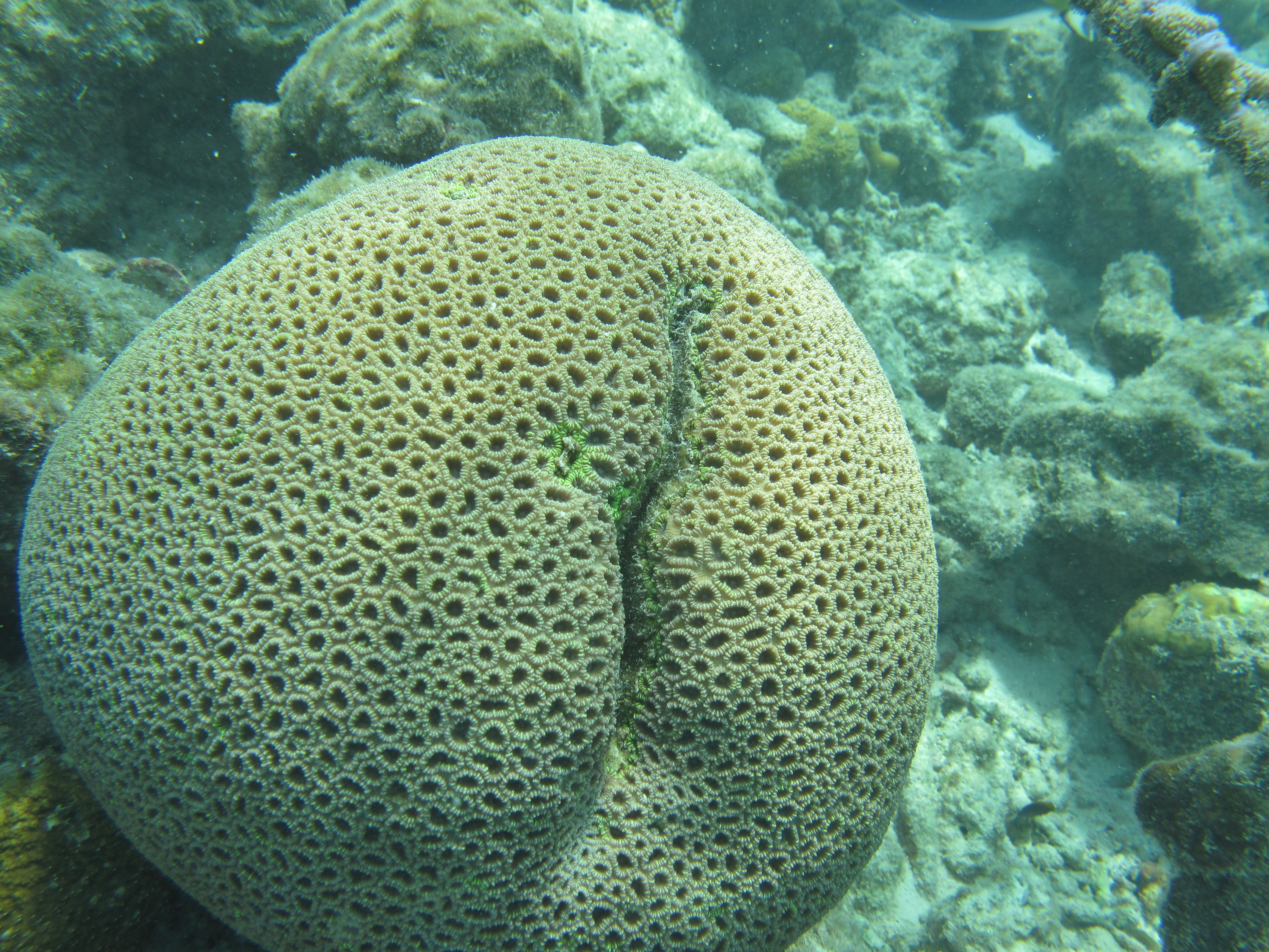 Une colonie de corail Dipsastraea pallida aux Maldives (Landaagiraavaru, Atoll de Baa).